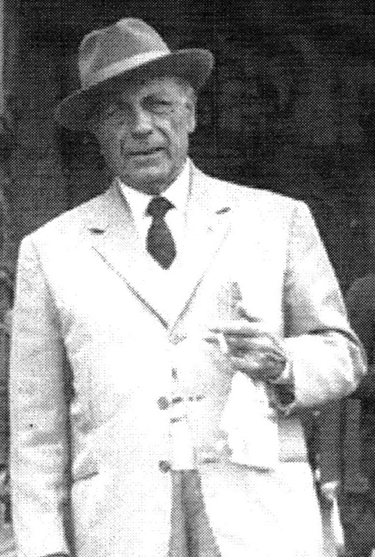 Giuseppe Marcantonio